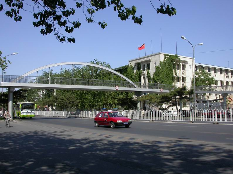 skyway in beijing taken in beijing.